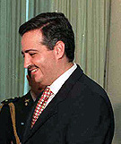 El presidente Carlos Menem recibió al ministro de emigrantes de la República del Líbano, el príncipe Talal Arslan.